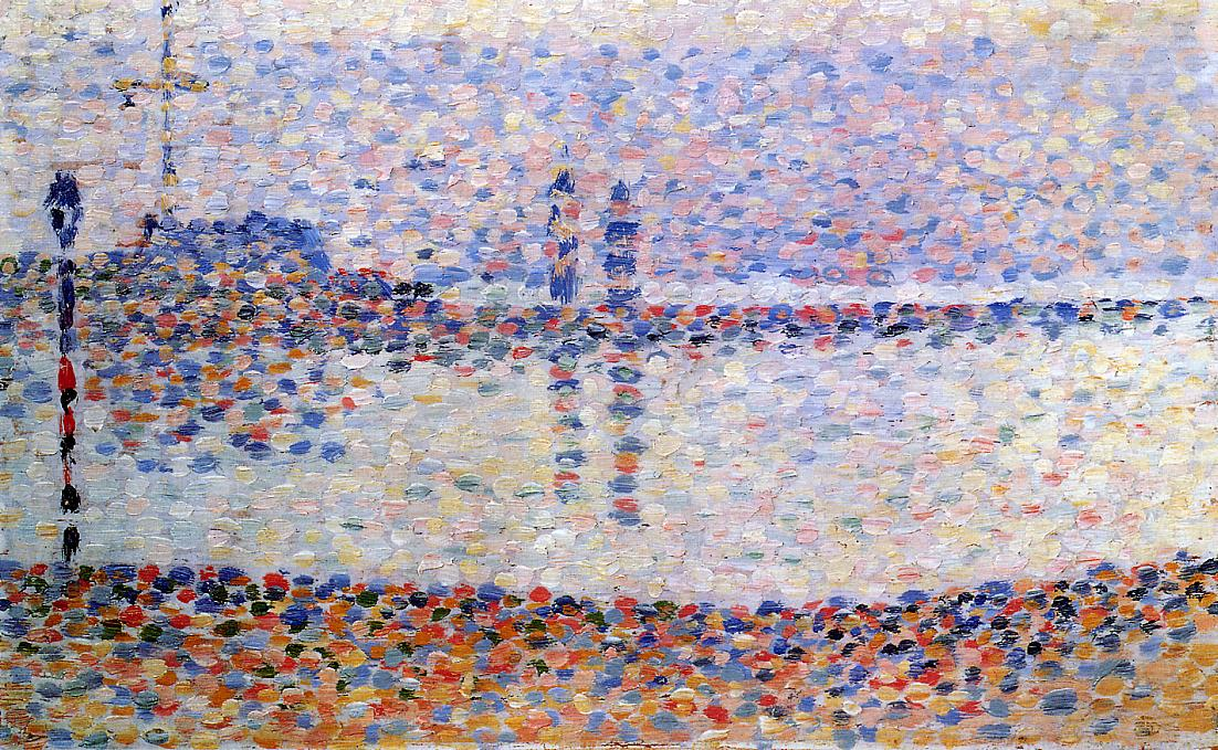 Gravelines : un soir, étude